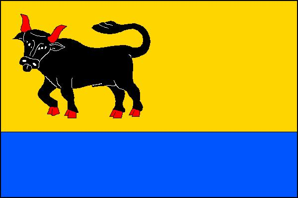 Vlajka obce Tuřice